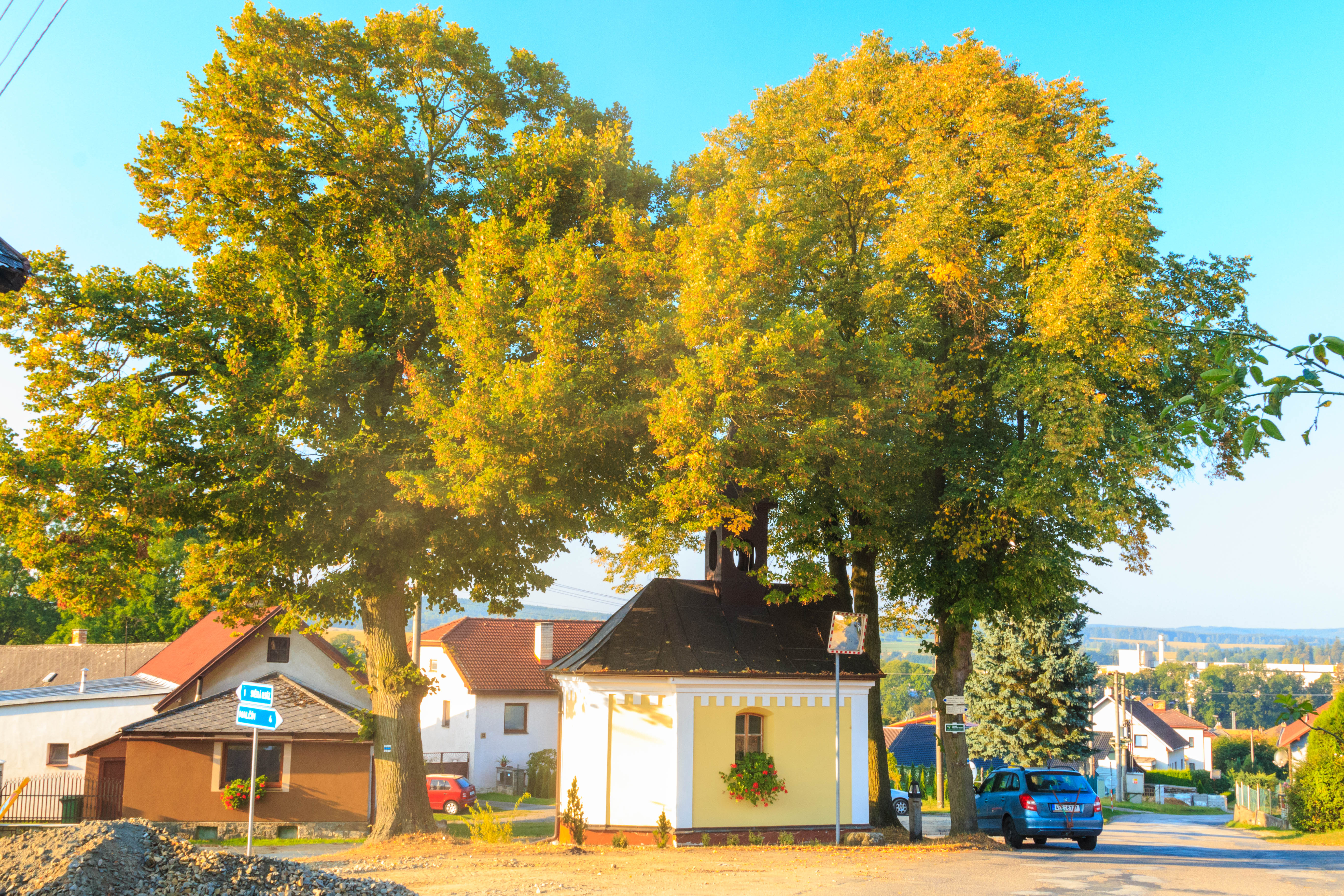 Příseka u Světlé nad Sázavou - kaple